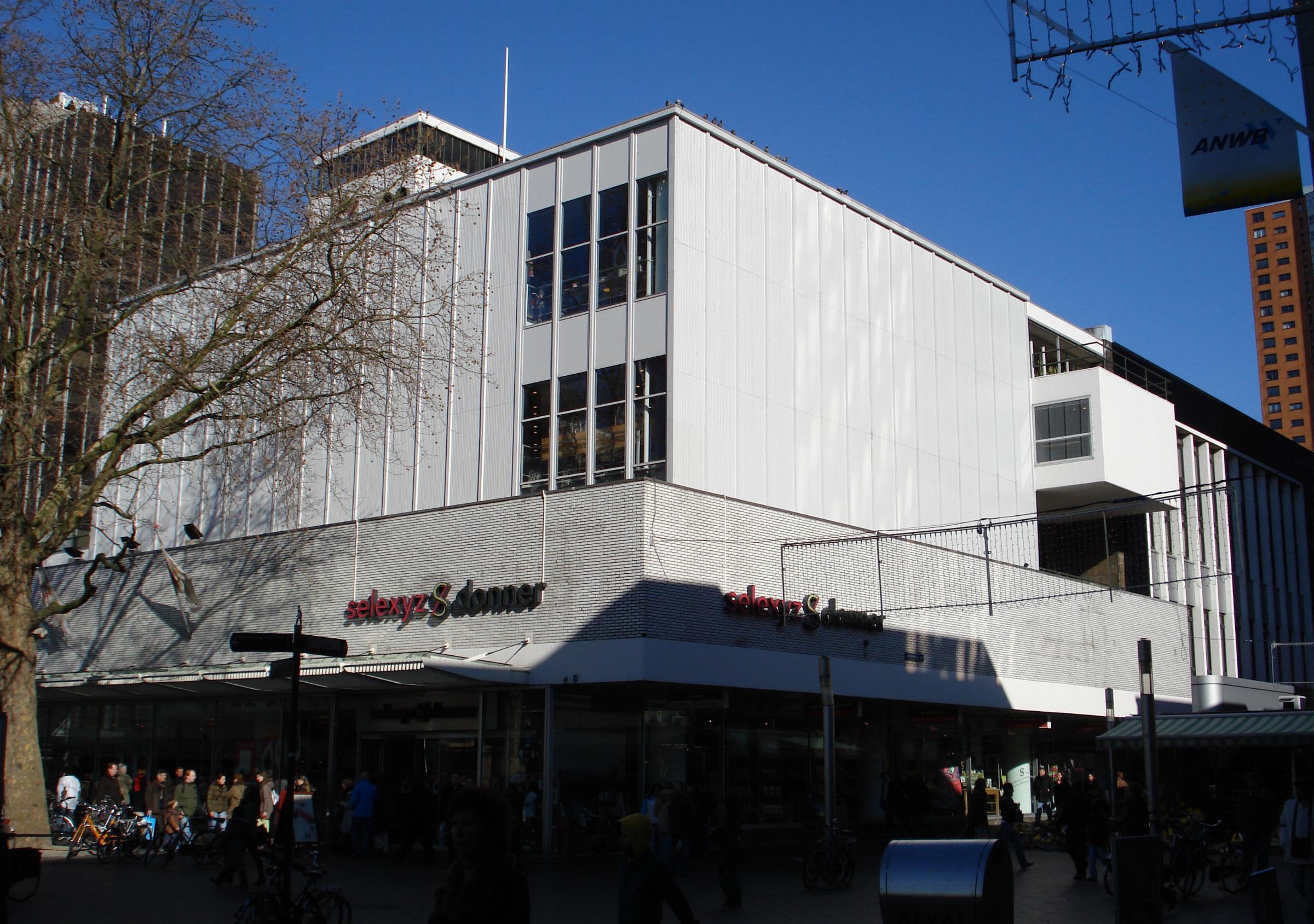 Rotterdam, Lijnbaan 148-150. Boekwinkel Donner onder de naam Selexys&Donner. Gemeentemonument. Voorheen Meubelwarenhuis H.H. De Klerk.